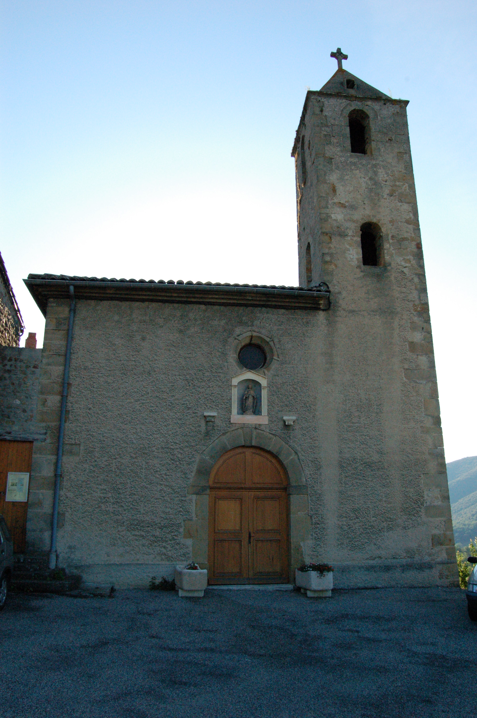 Eglise de Toulaud